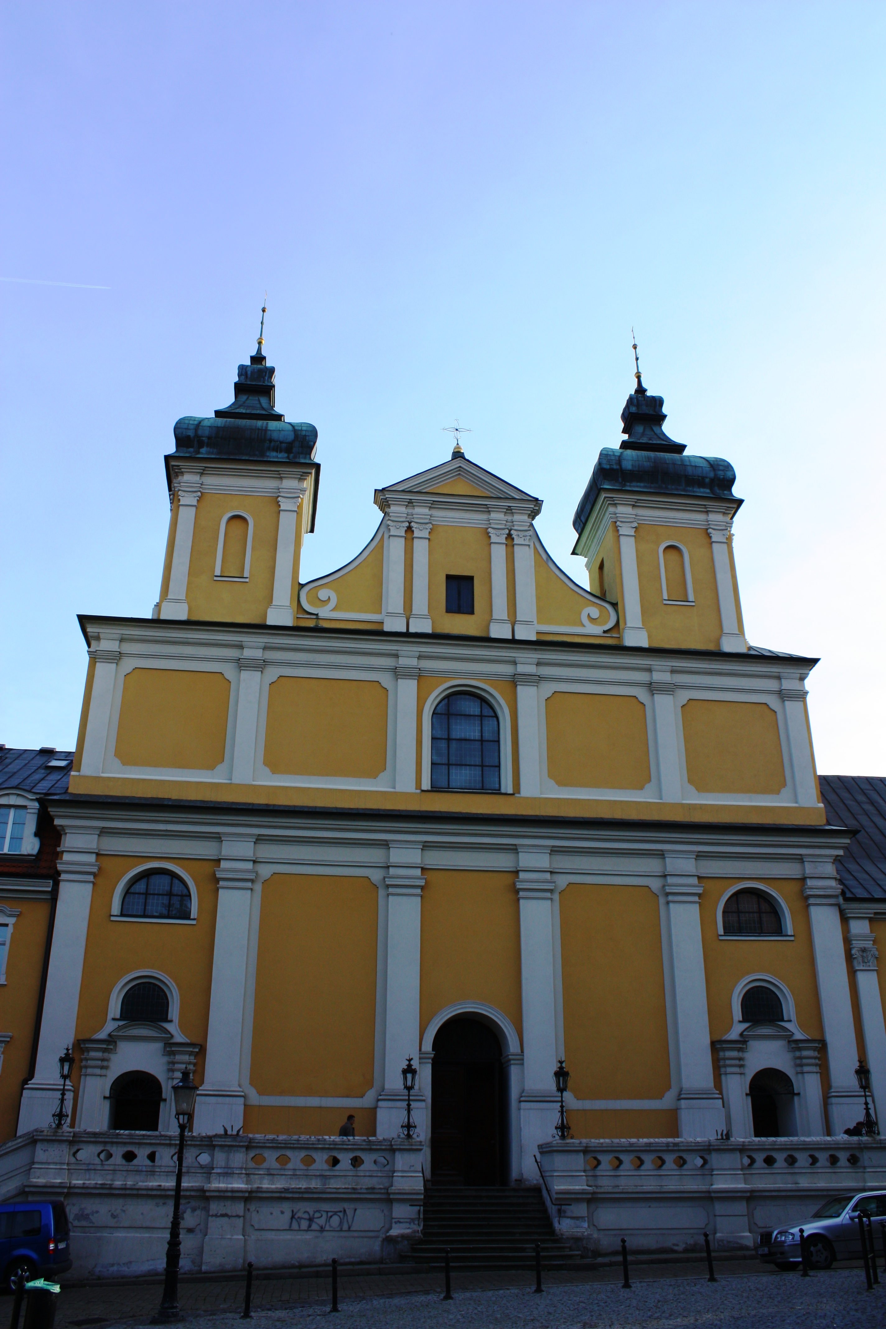 Poznań, ul. Franciszkańska 2 - Kościół Franciszkanów pw. św. Antoniego Padewskiego w zespole franciszkanów konwentualnych (zabytek nr A 161 z 25.02.1931)